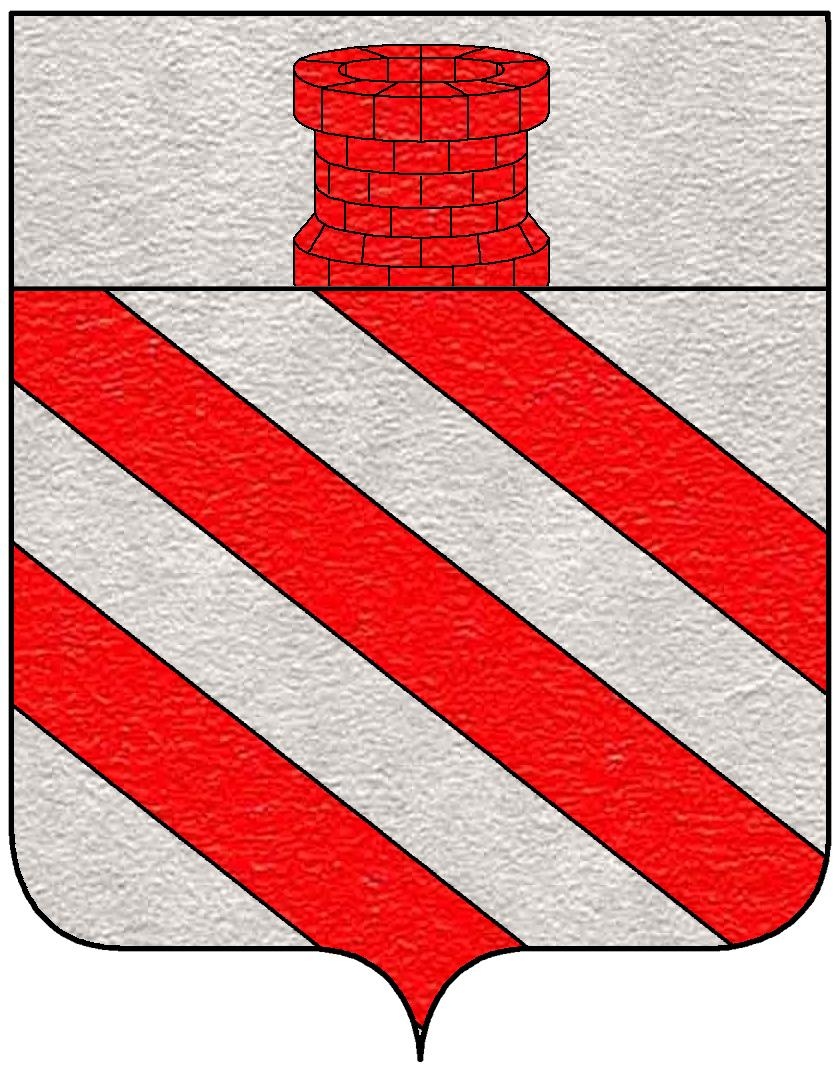 Stemma della famiglia Apuzzo